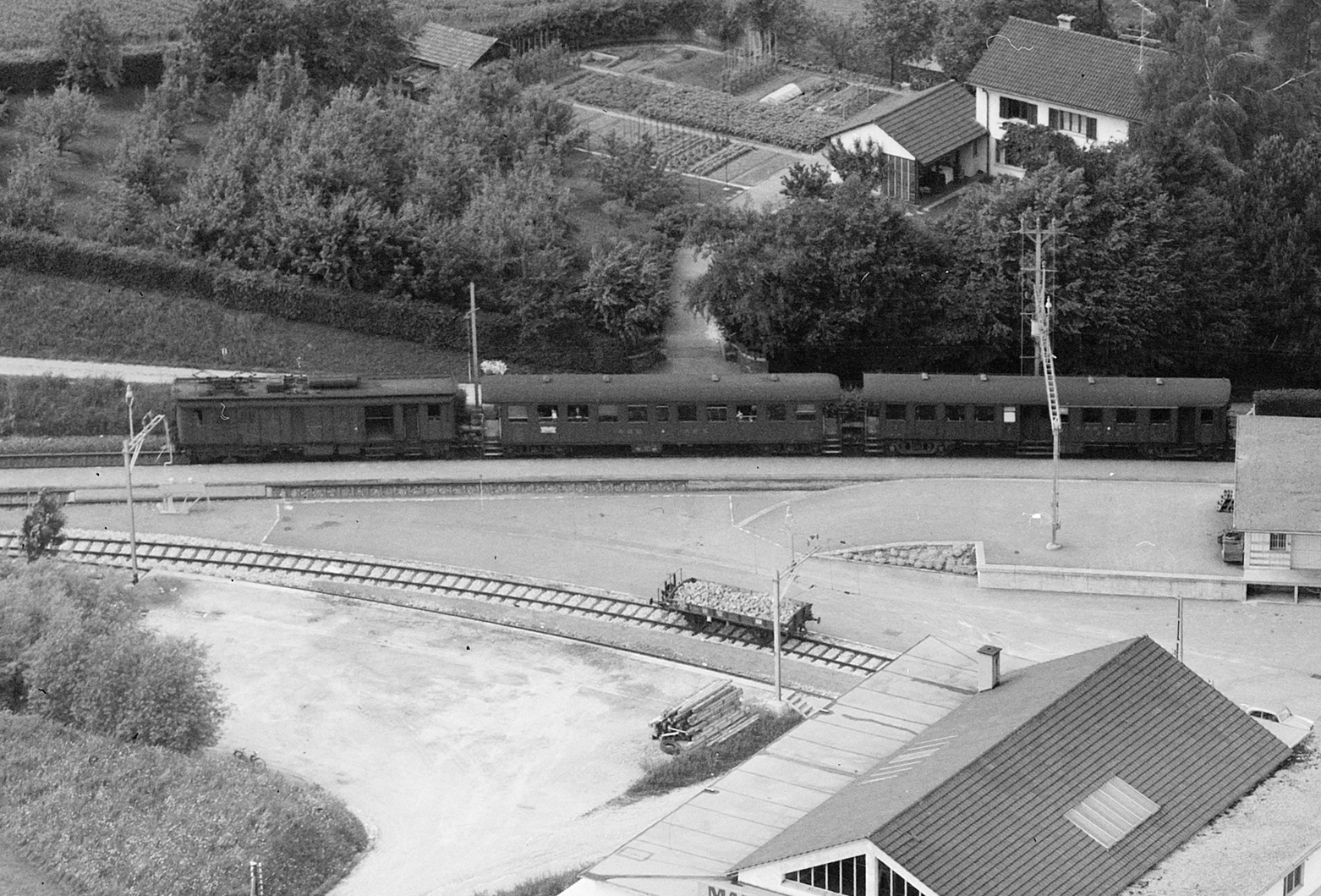 De 4/4-Pendelzug im Bahnhof Steinmaur im Jahre 1963. Am Bahnhof wird Fahrleitungs- und Obebaumaterial gelagert. Das Anschlussgleis der zukünfitgen Getreidesammelstelle ist neu erstellt.